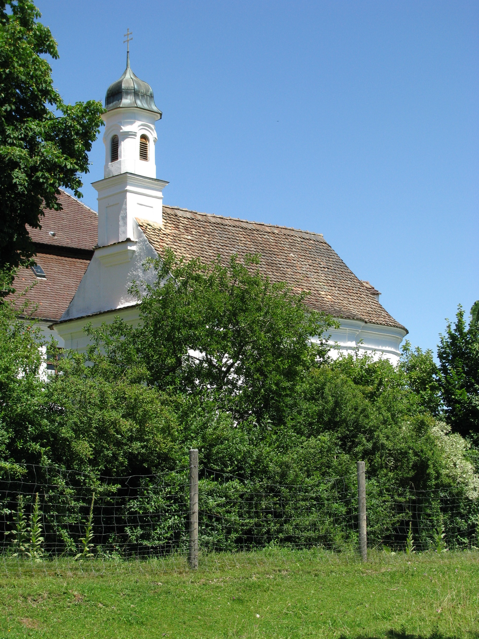 Katholische Kapelle Hl. Kreuz, 1735 von Joseph Schmuzer. This is a photograph of an architectural monument.